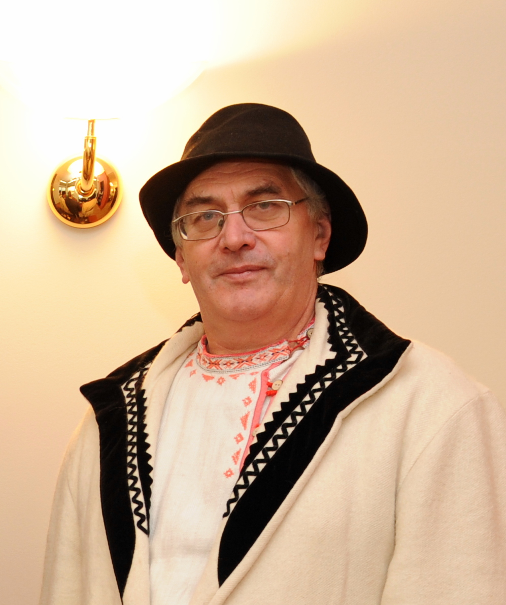 Aare Hõrn, setu elu edendaja